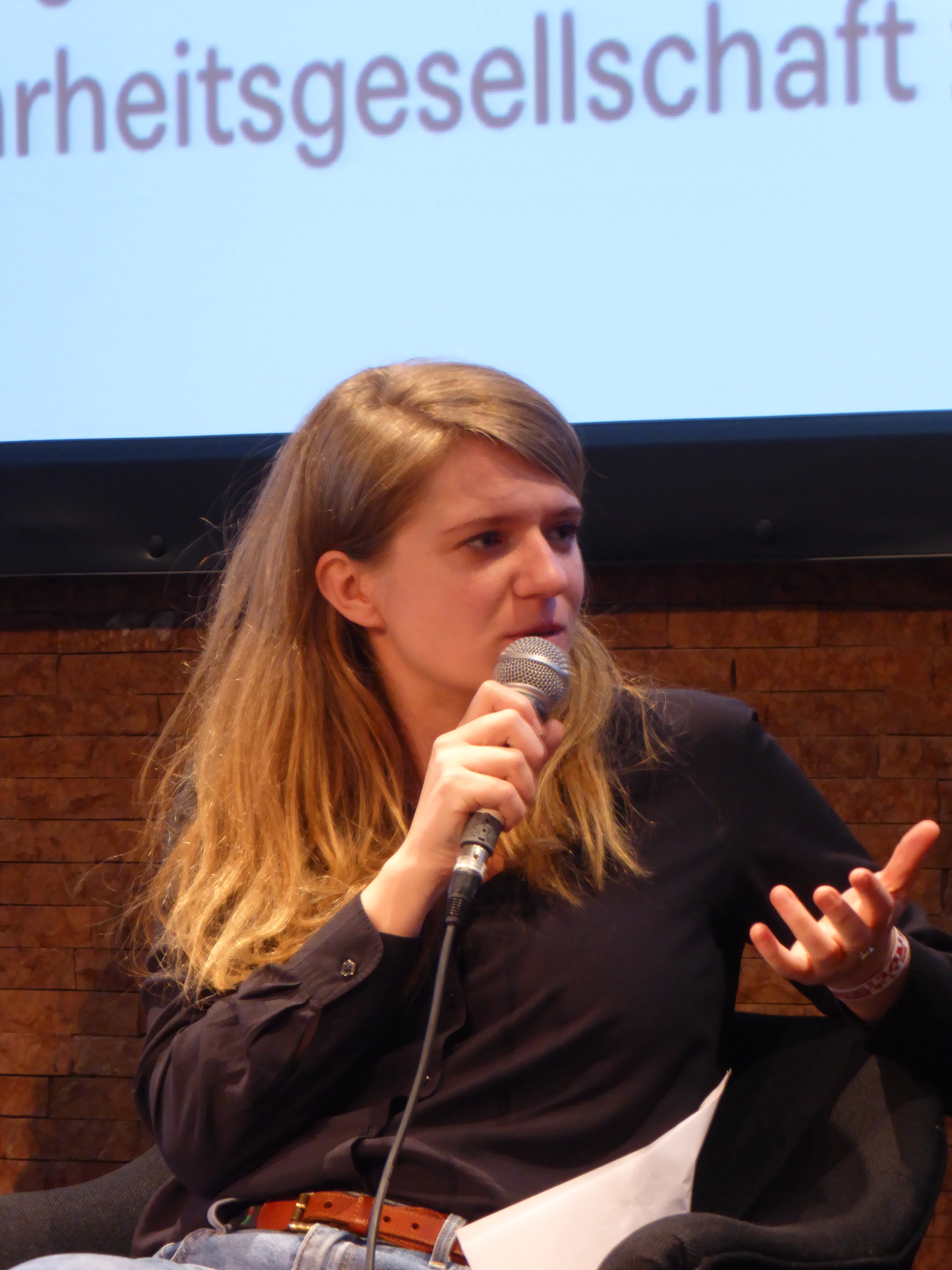 Die Journalistin Katrin Gottschalk während der Veranstaltung: „Nach dem Streicheln - Kompliz*innenschaft ohne Helfer*innensyndrom“, auf dem taz.lab 2016, am Samstag, den 02.04.2016, im Haus der Kulturen der Welt ({HKW} „Kongresshalle Berlin“ [Berliner Spitznamen „Schwangere Auster“])